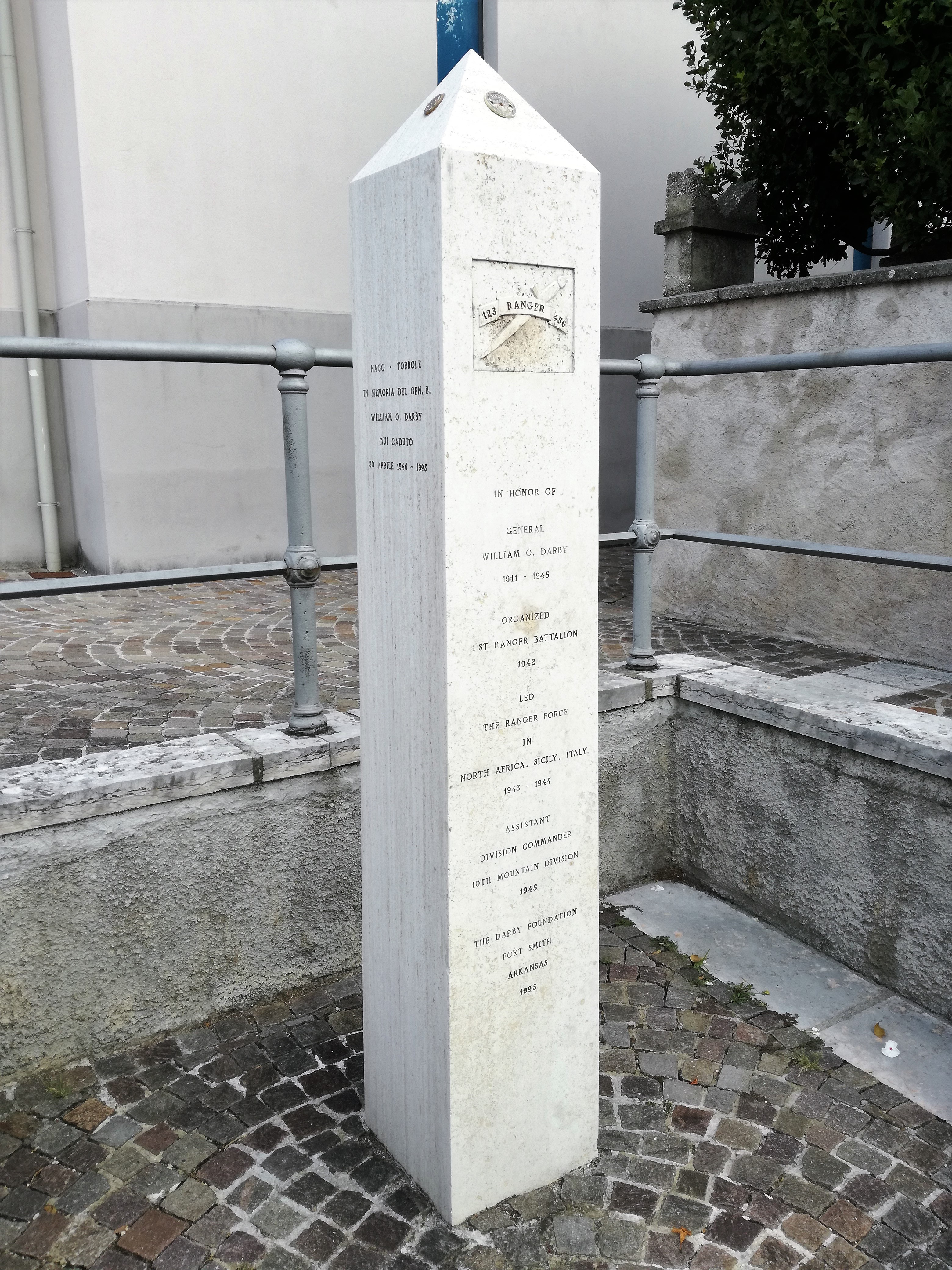 Stele für Colonel William O. Darby in Torbole Gardasee errichtet an der Stelle an der er starb.